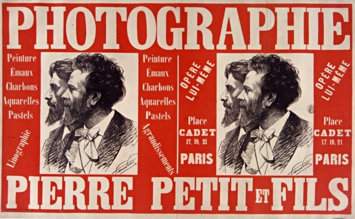 Affiche pour les photographes Pierre Petit et fils.